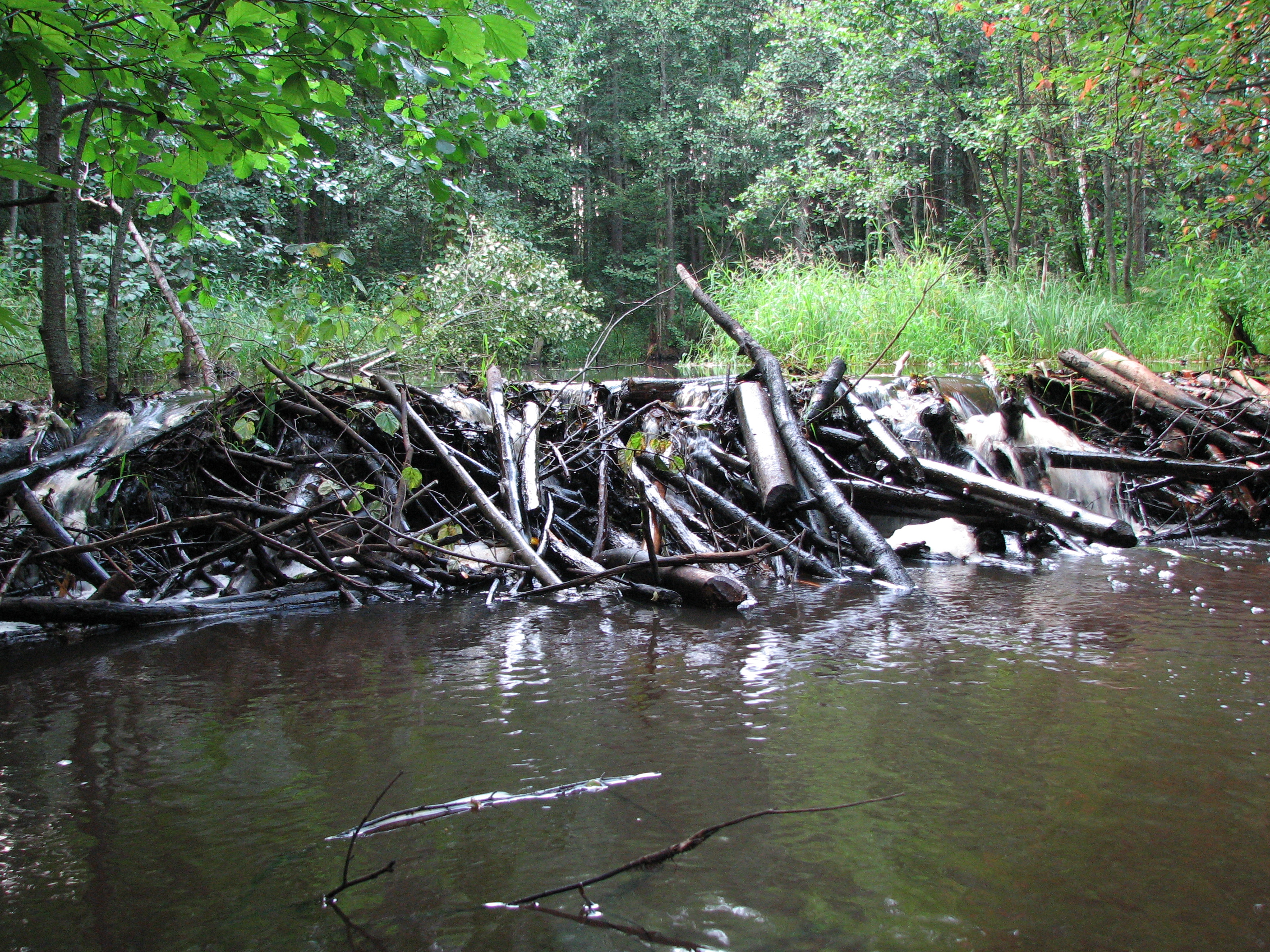 Керженский заповедник: Находится в 50 км на северо-восток от г. Нижнего Новгорода и расположен в Борском и Семеновском районах Нижегородской области на левом берегу реки Керженец, притока реки Волги,Семёновский район, Нижегородская область This image is related to the protected area of Russia number 5200494